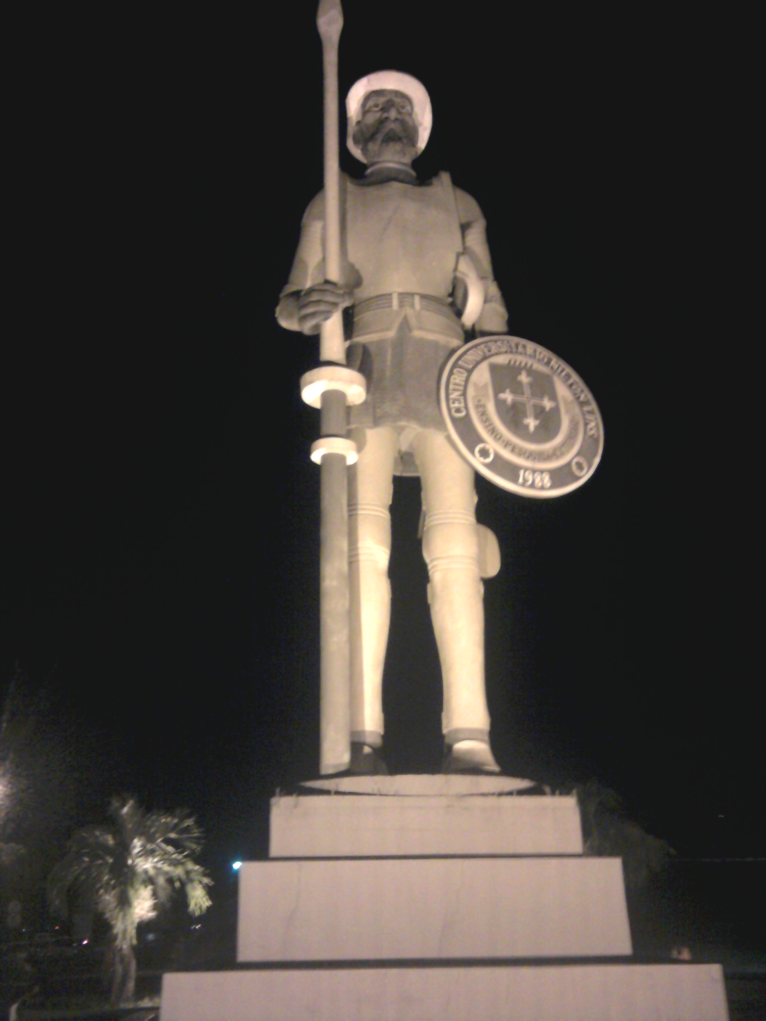 Estatua de Dom Quixote presente na entrada principal da Universidade Nilton Lins.